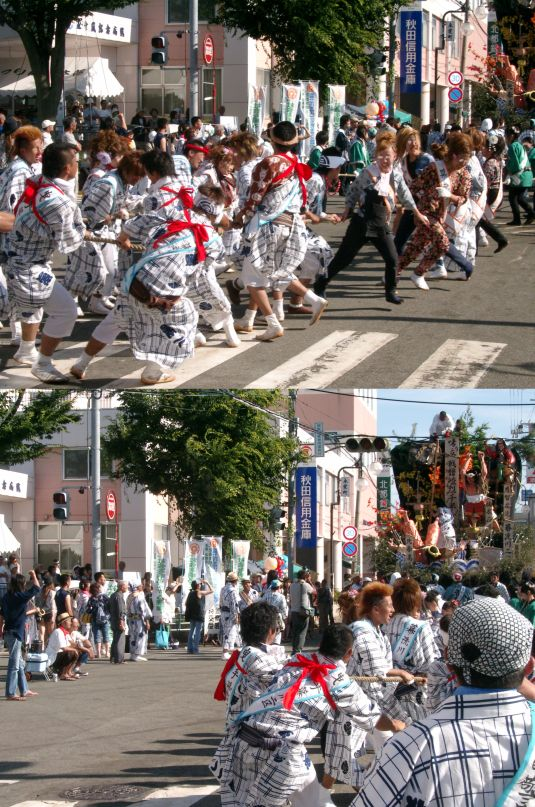 土崎神明社祭の曳山行事の写真